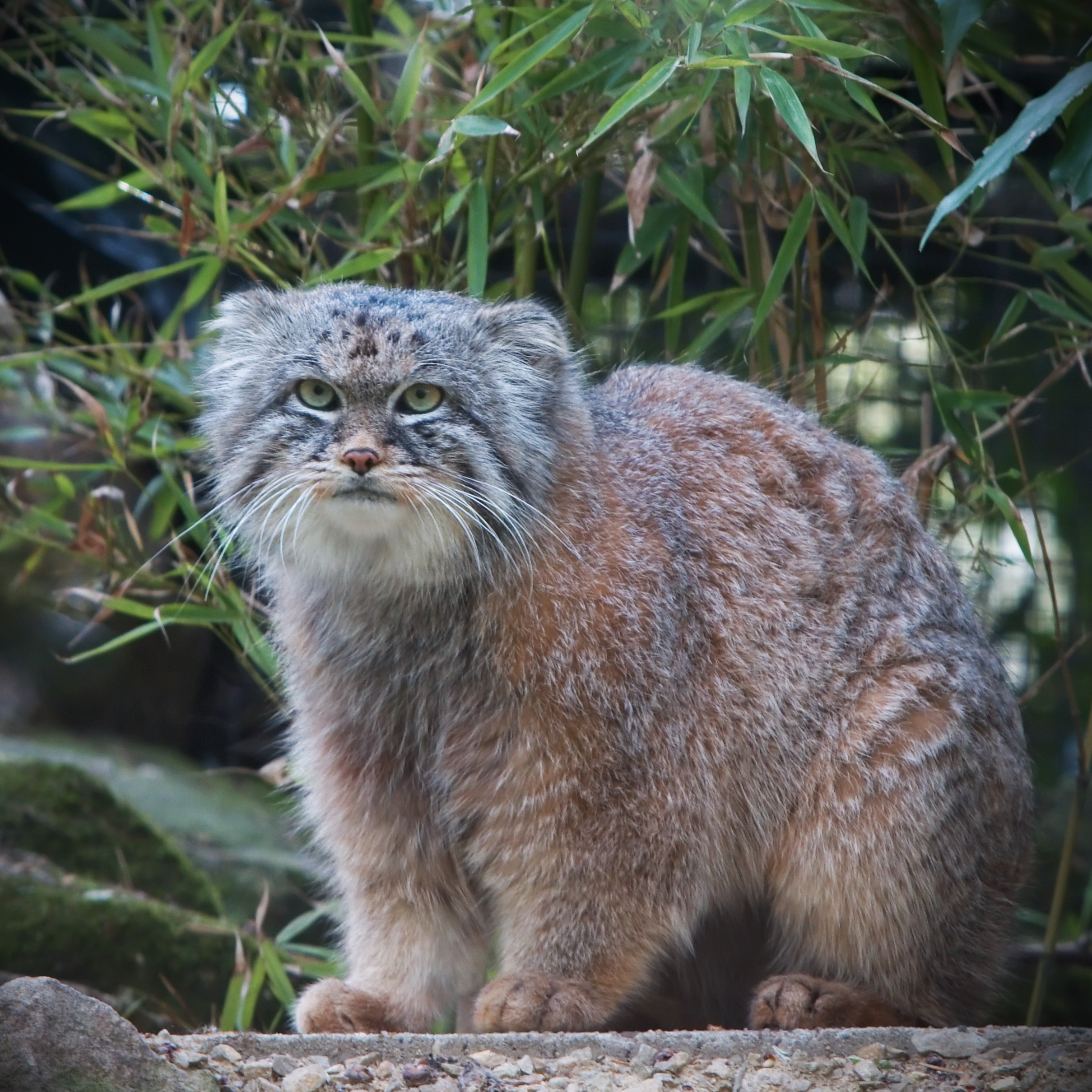 Felis Manul from Diergaarde Blijdorp, Rotterdam Zoo.